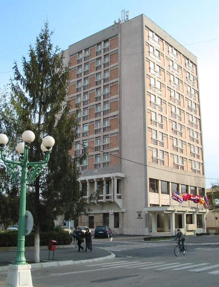 A hotel in Turnu Măgurele, Romania